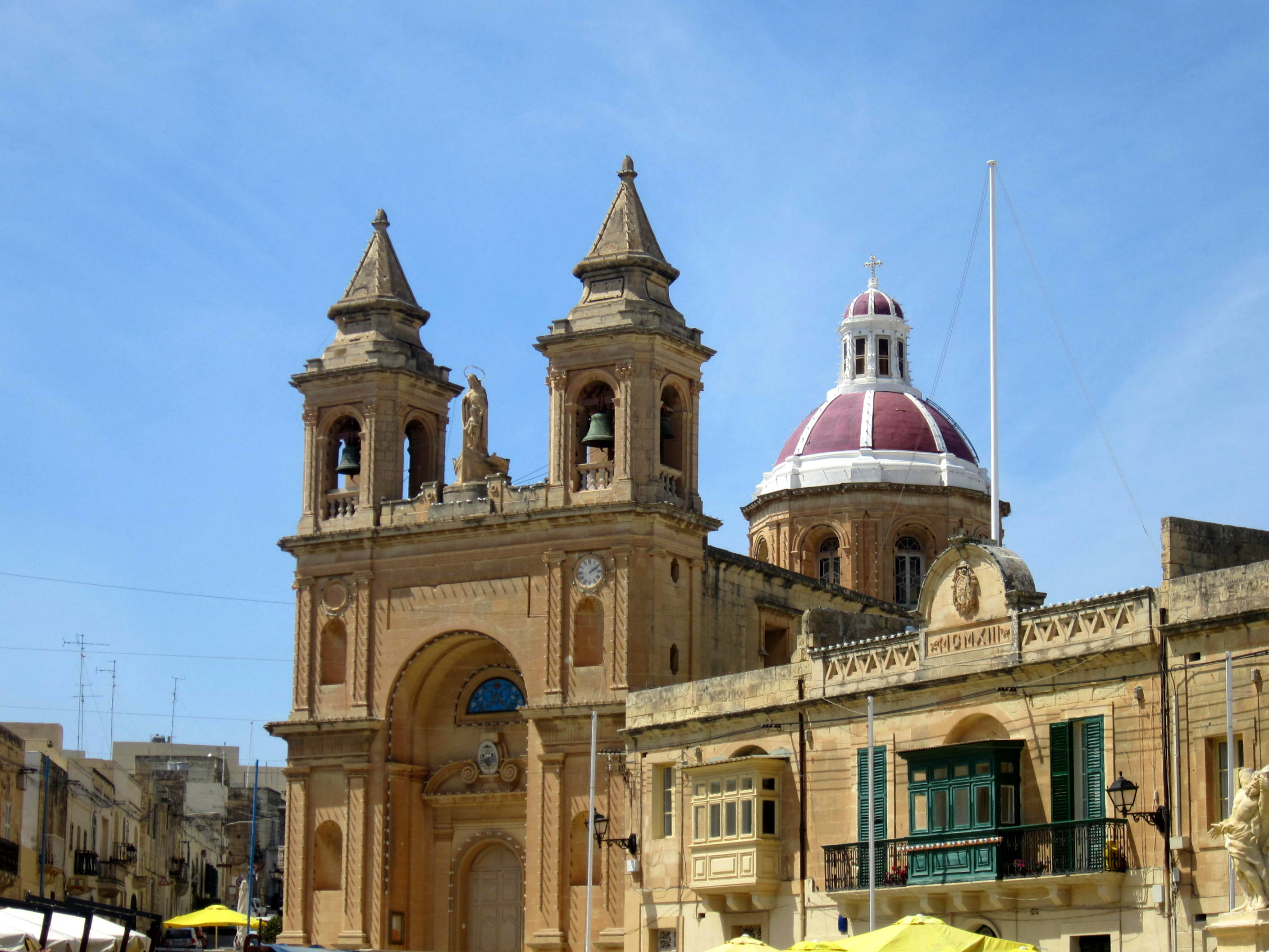 Chiesa parrocchiale di Marsaxlokk o Marsa Scirocco